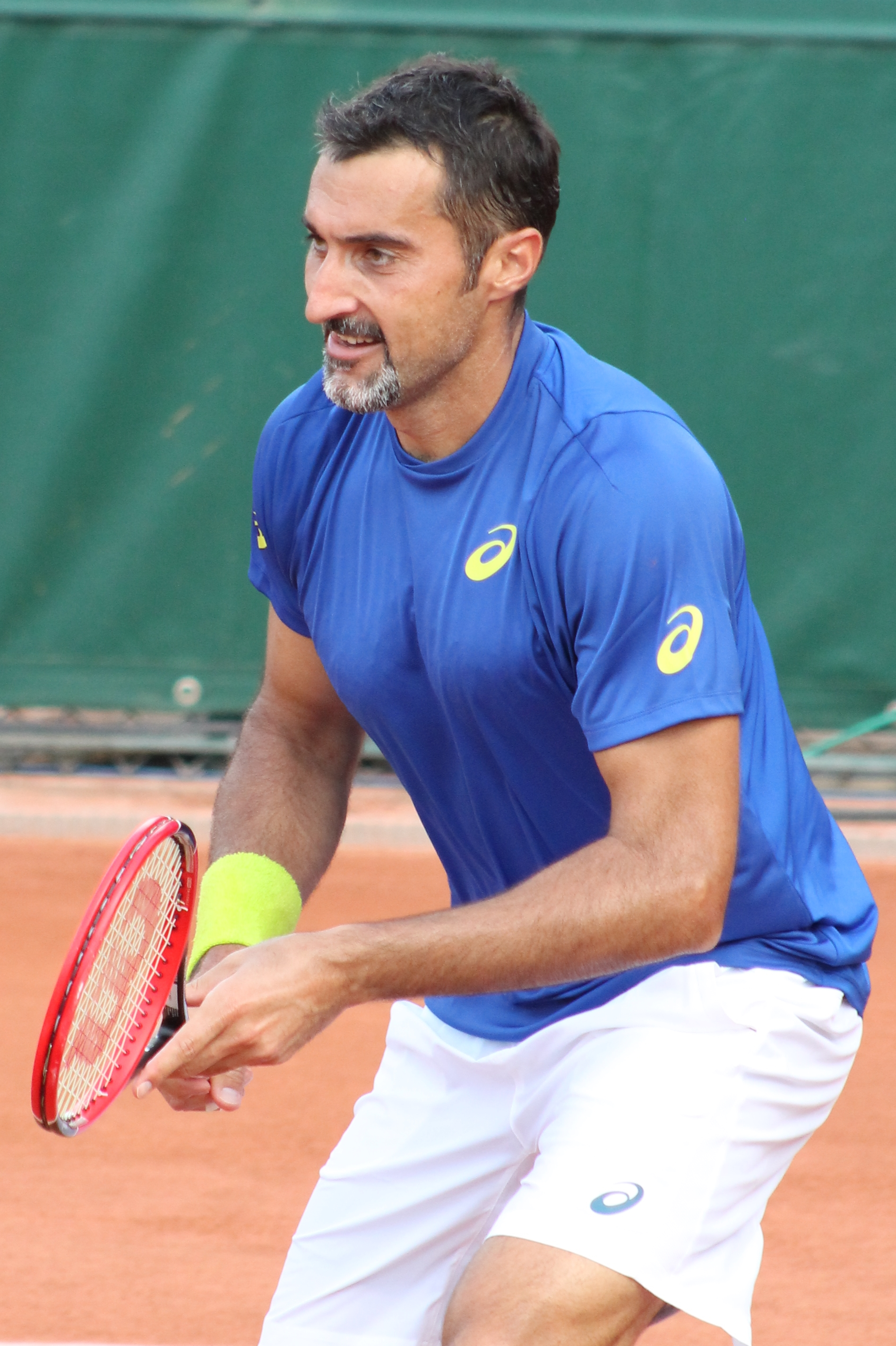 Zimonjic RG16 (8)